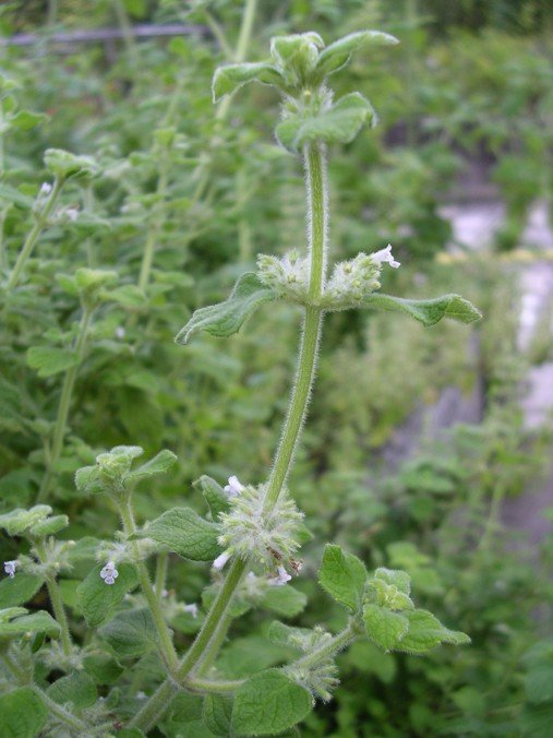 Inflorescencia de Minthostachys mollis.